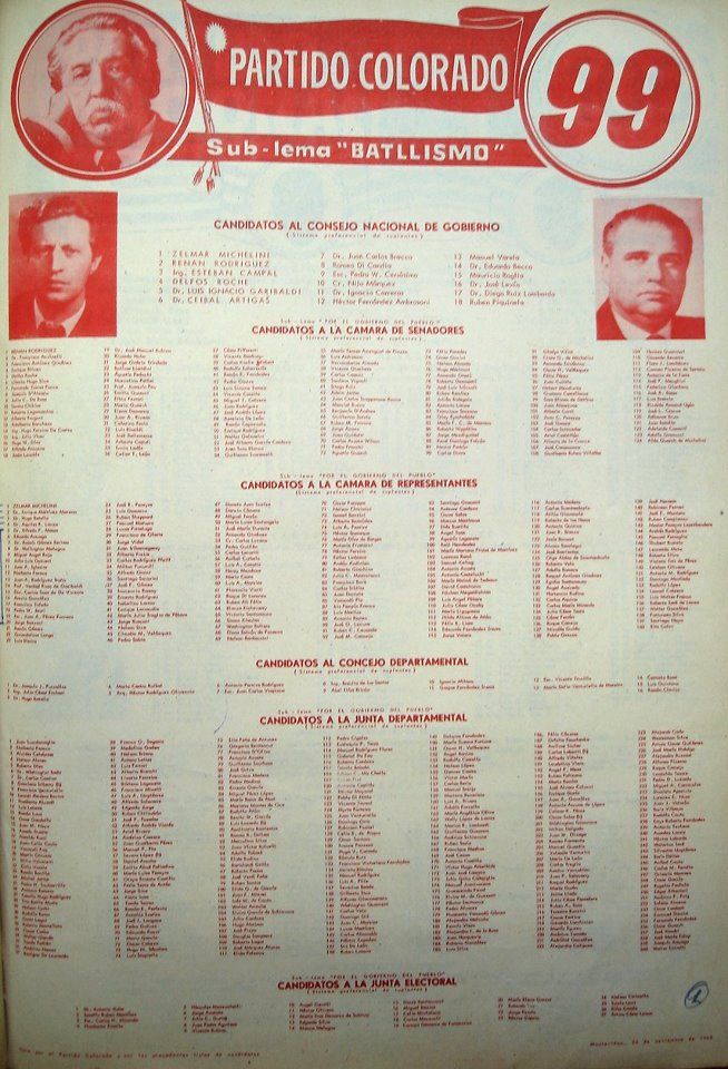 Lista 99 en las elecciones generales de Uruguay de 1962. Fueron electos los siguientes candidatos:*Senado: Renán Rodríguez, Francisco Accinelli;*Diputados por Montevideo: Zelmar Michelini, Enrique Martínez Moreno, Hugo Batalla, Aquiles Lanza, Alfredo Massa.